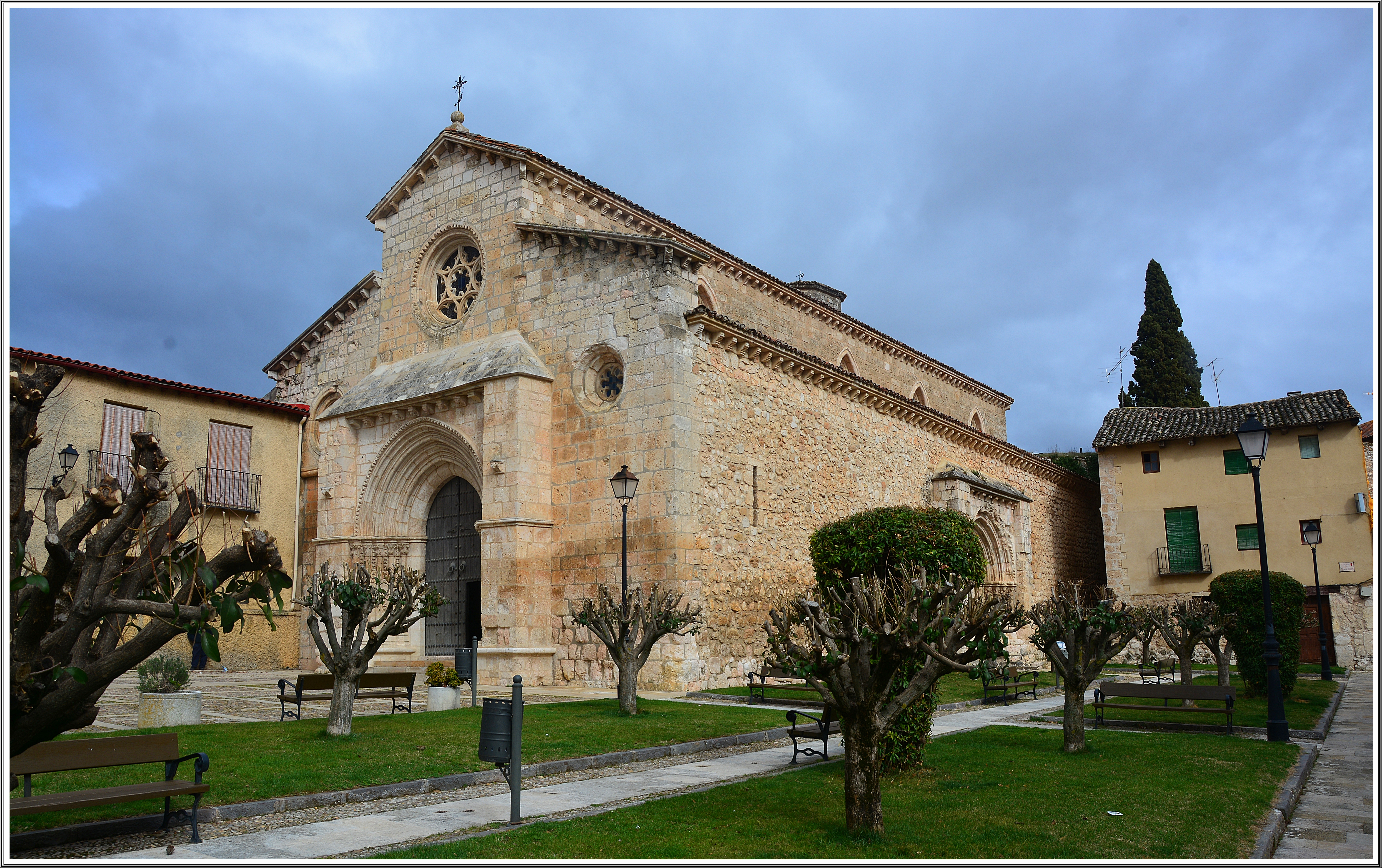 Brihuega - Iglesia de San Felipe La Iglesia de San Felipe data del siglo XIII y es una bella muestra del estilo románico en transición con el gótico. Consta de tres naves siendo la central la más grande. Estas naves están separadas entre sí por cinco arcos sostenidos cuyas columnas constan de capiteles con motivos florales. En su historia ha pasado por diversas vicisitudes. Durante la Guerra de Sucesión (1710) sufrió graves daños, en 1904 quedó gravemente dañada a causa de un incendio y durante la Guerra Civil fue utilizada como almacén de piensos. Pese a ello, siempre ha sido reconstruida conservando su esbeltez y sobriedad, mostrándose como un singular ejemplo del románico español y una de las construcciones más emblemáticas de Brihuega.